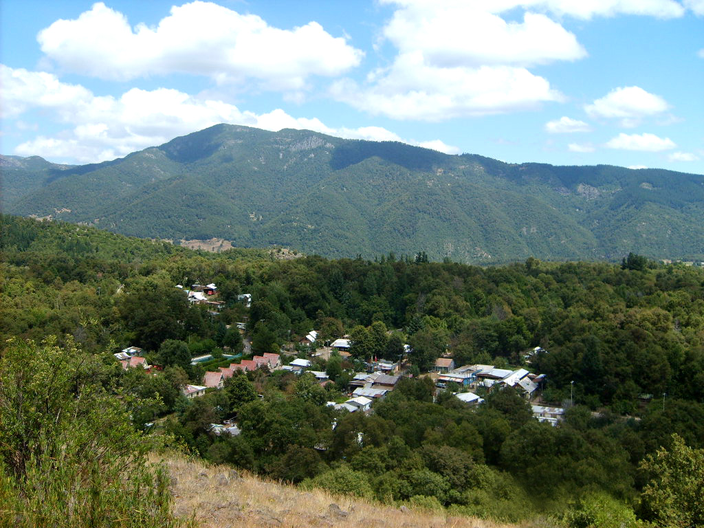 Pueblo de Los Lleuques. Tonw of Los Lleuques Chile